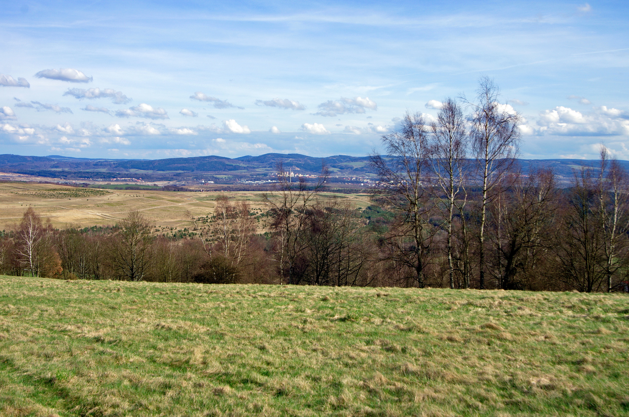 Sokolovská pánev, pohled ze svahů Krušných hor u obce Boučí, v pozadí Slavkovský les, okres Sokolov